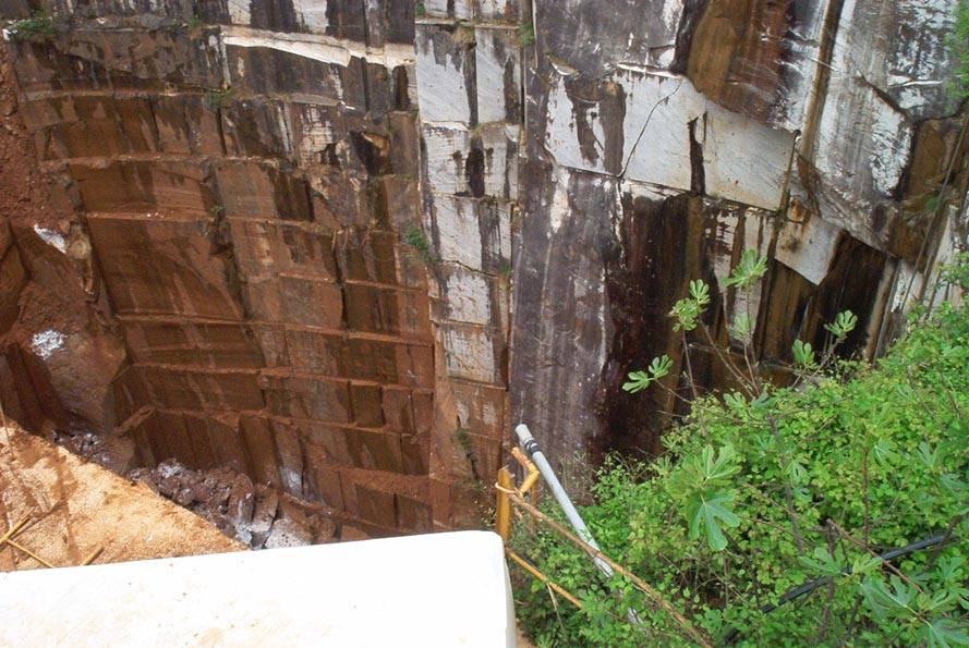 Die Mine/Grube des Carrara Marmor